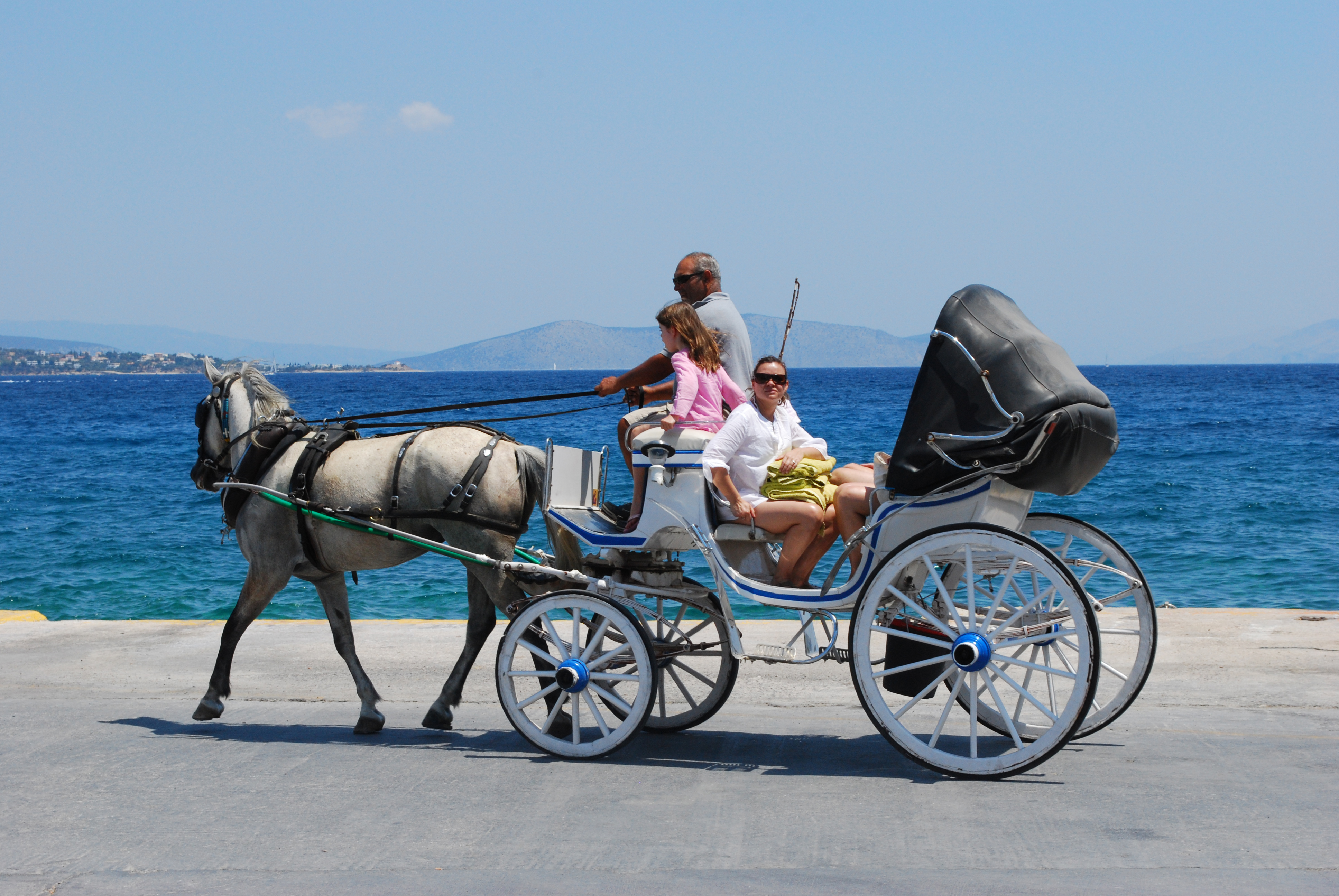 Calèche à Spetses.